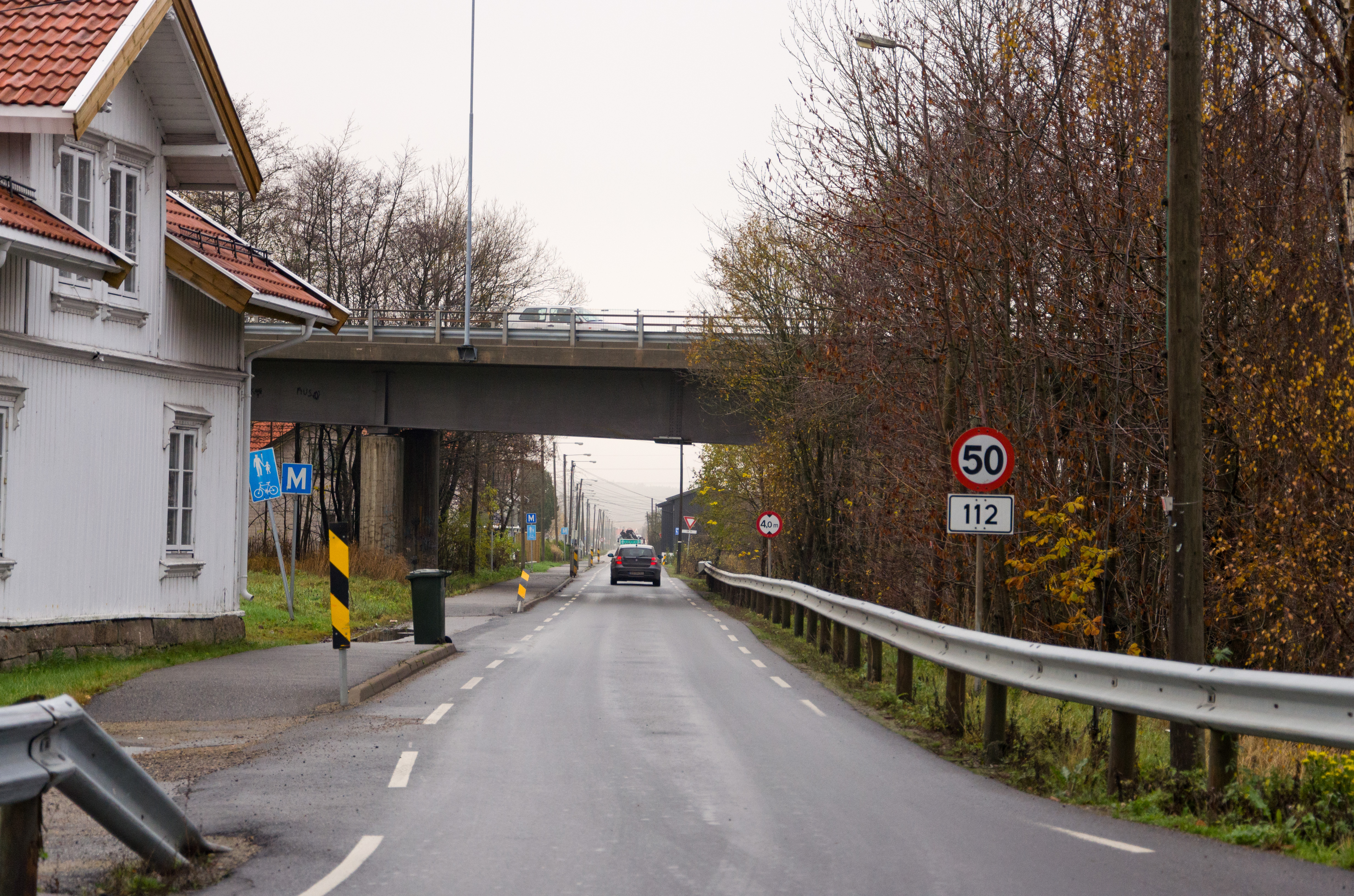 Østfolds fylkesvei 112